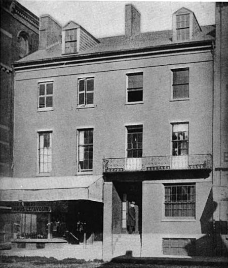 Boston, Massachusetts